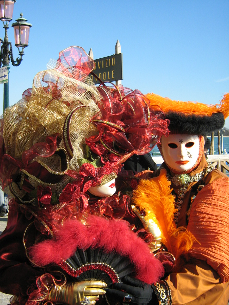 Carnevale di Venezia